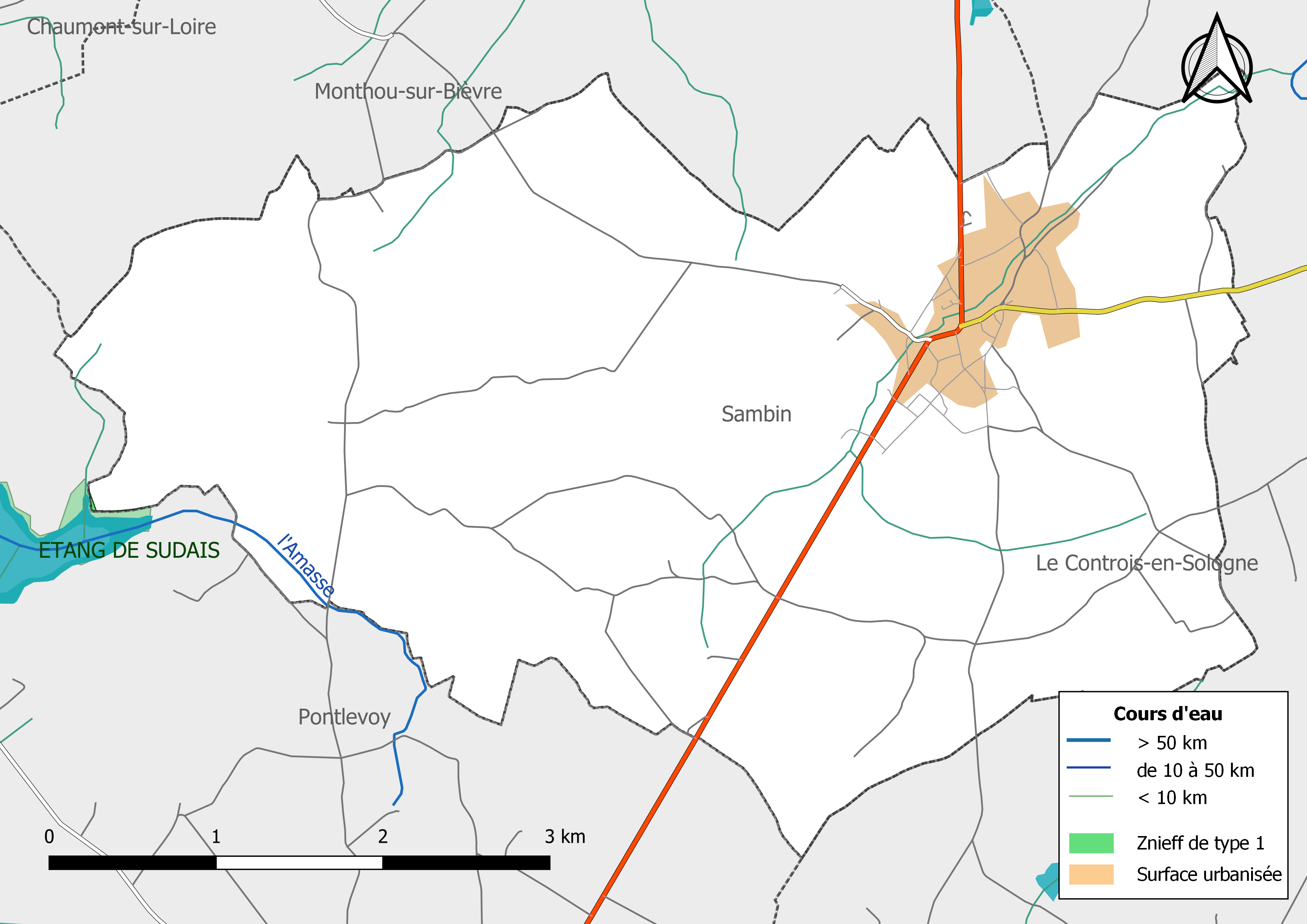 Zones naturelles d'intérêt écologique faunistique et Floristique (ZNIEFF) de type 1 de la commune de Sambin. (Loir-et-Cher, France).